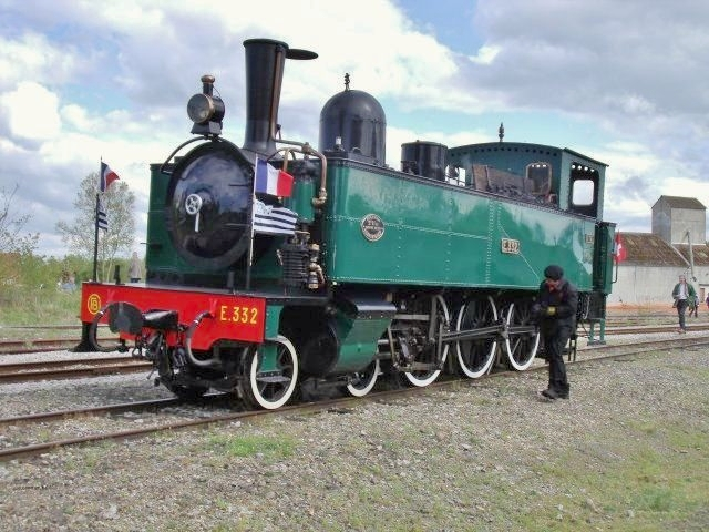 2'C Tenderlokomotive von Fives-Lille Nummer E 332 der Chemin de fer de la baie de Somme (CFBS) am Dampffestival 2009.